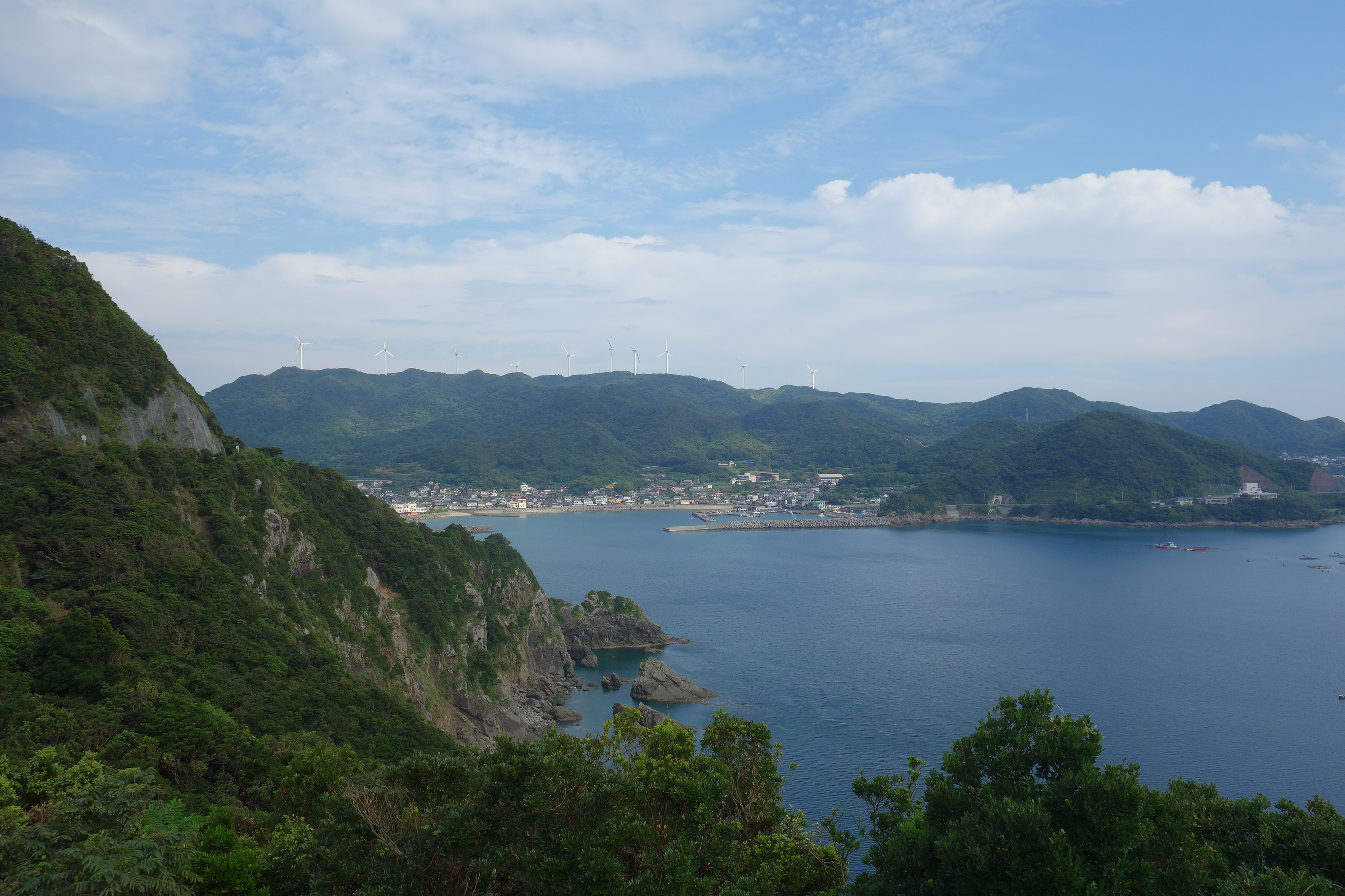 坊津町泊浦 20150922